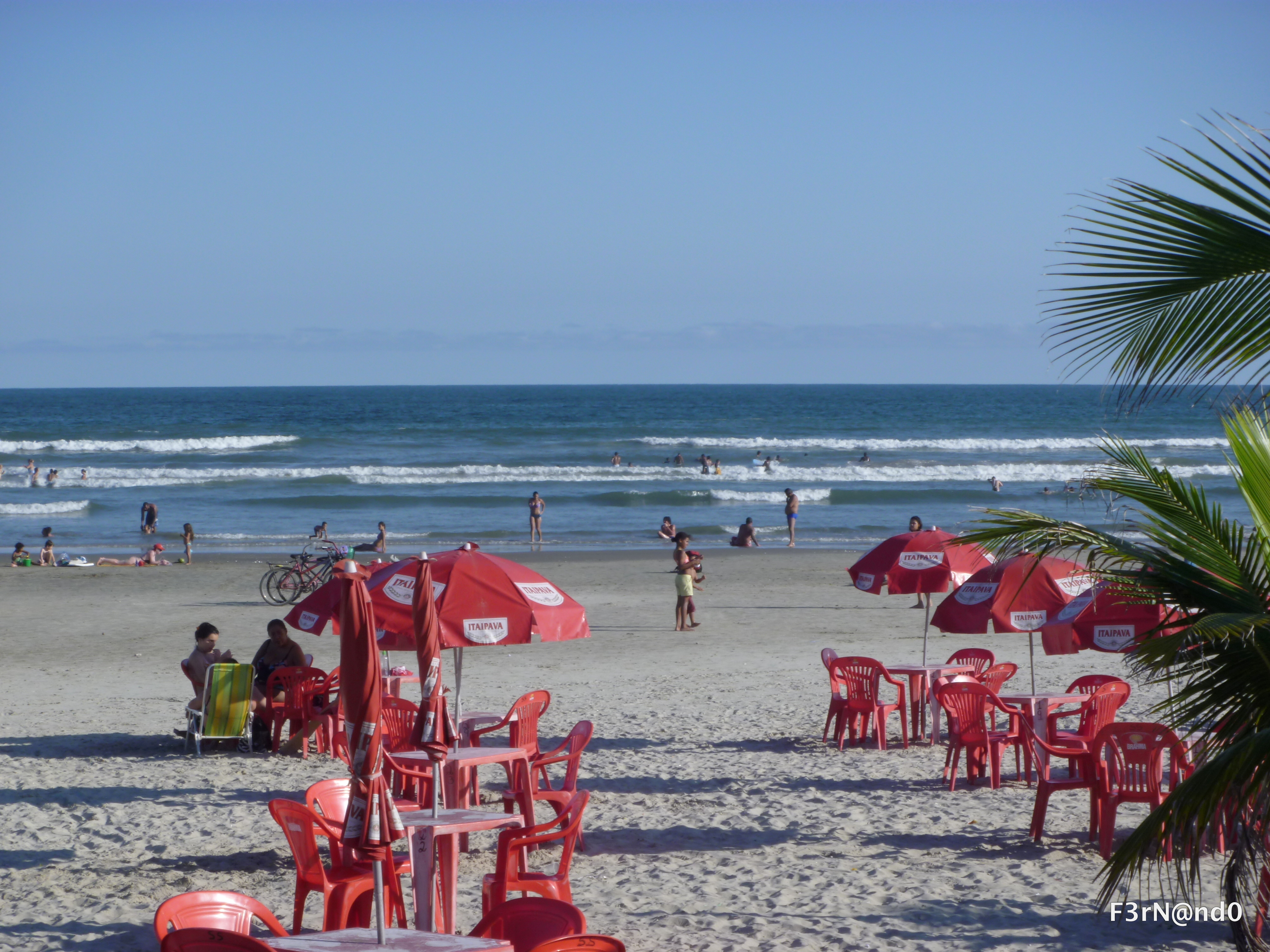 Praia Grande - São Paulo, Brasil